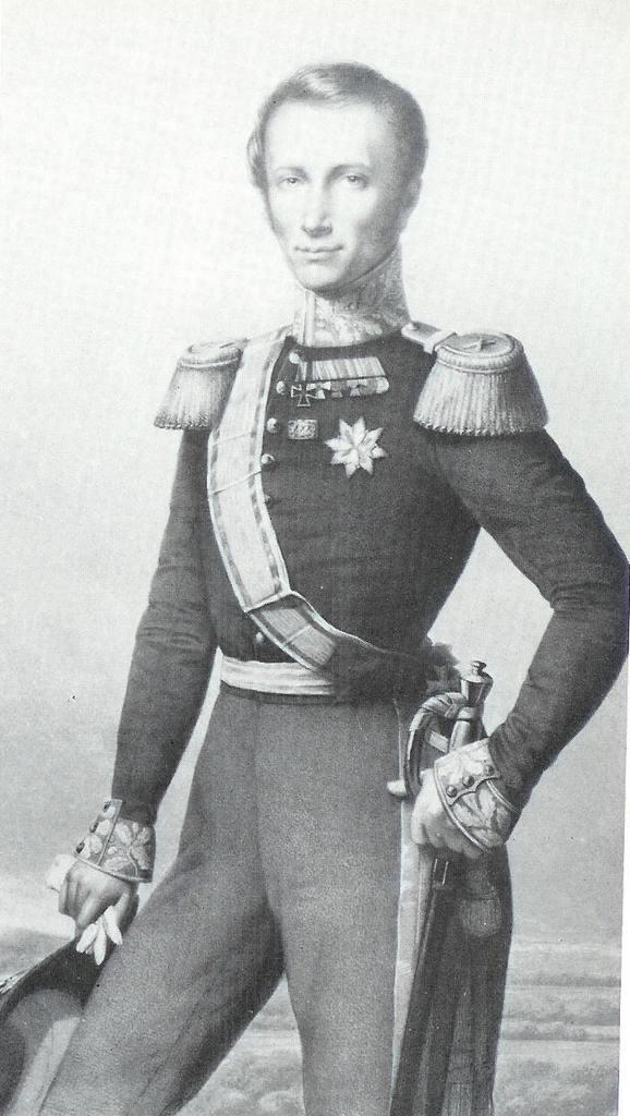 Portret van een jonge prins Frederik (1797-1881).